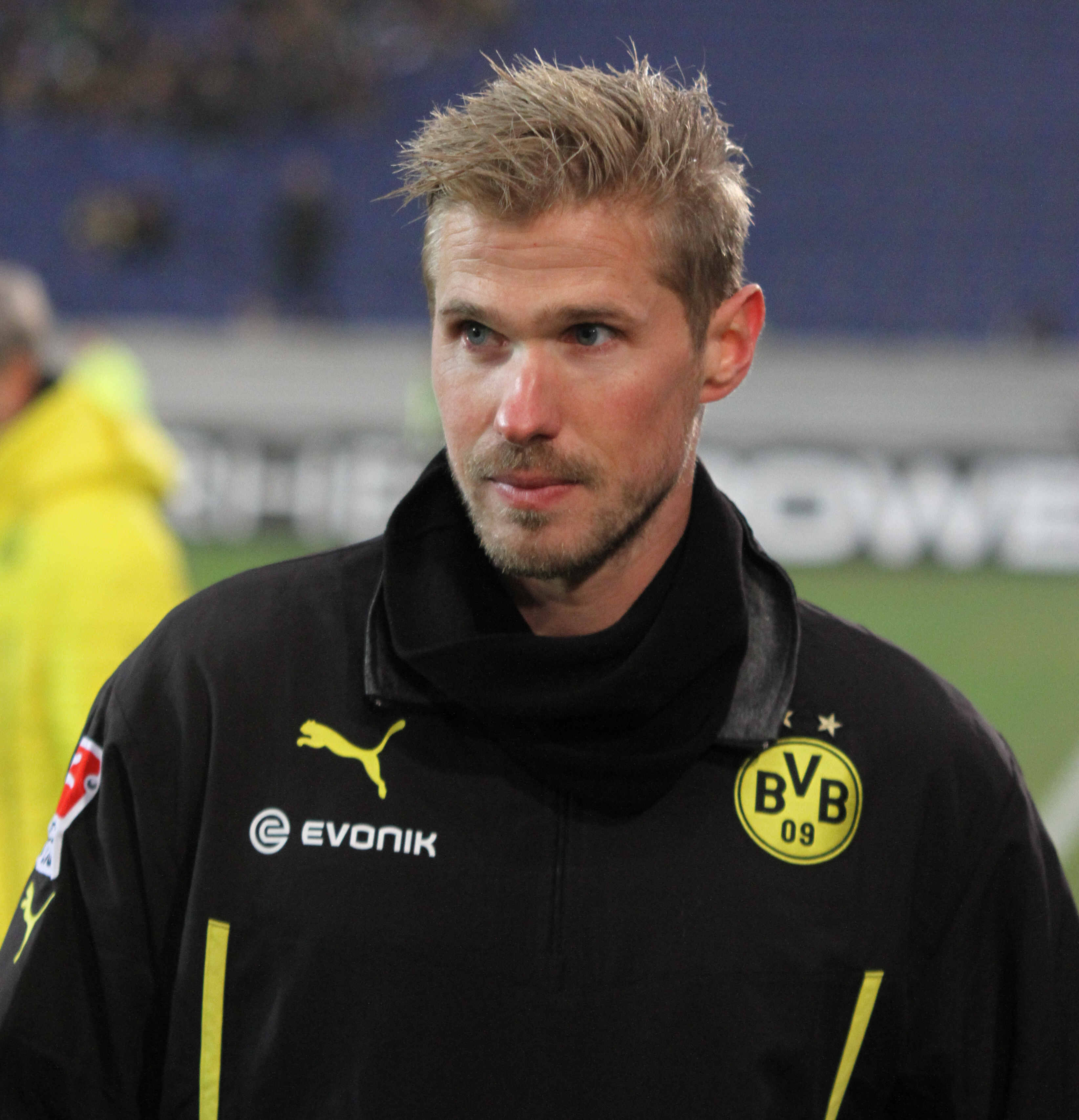 Oliver Kirch (Borussia Dortmund)